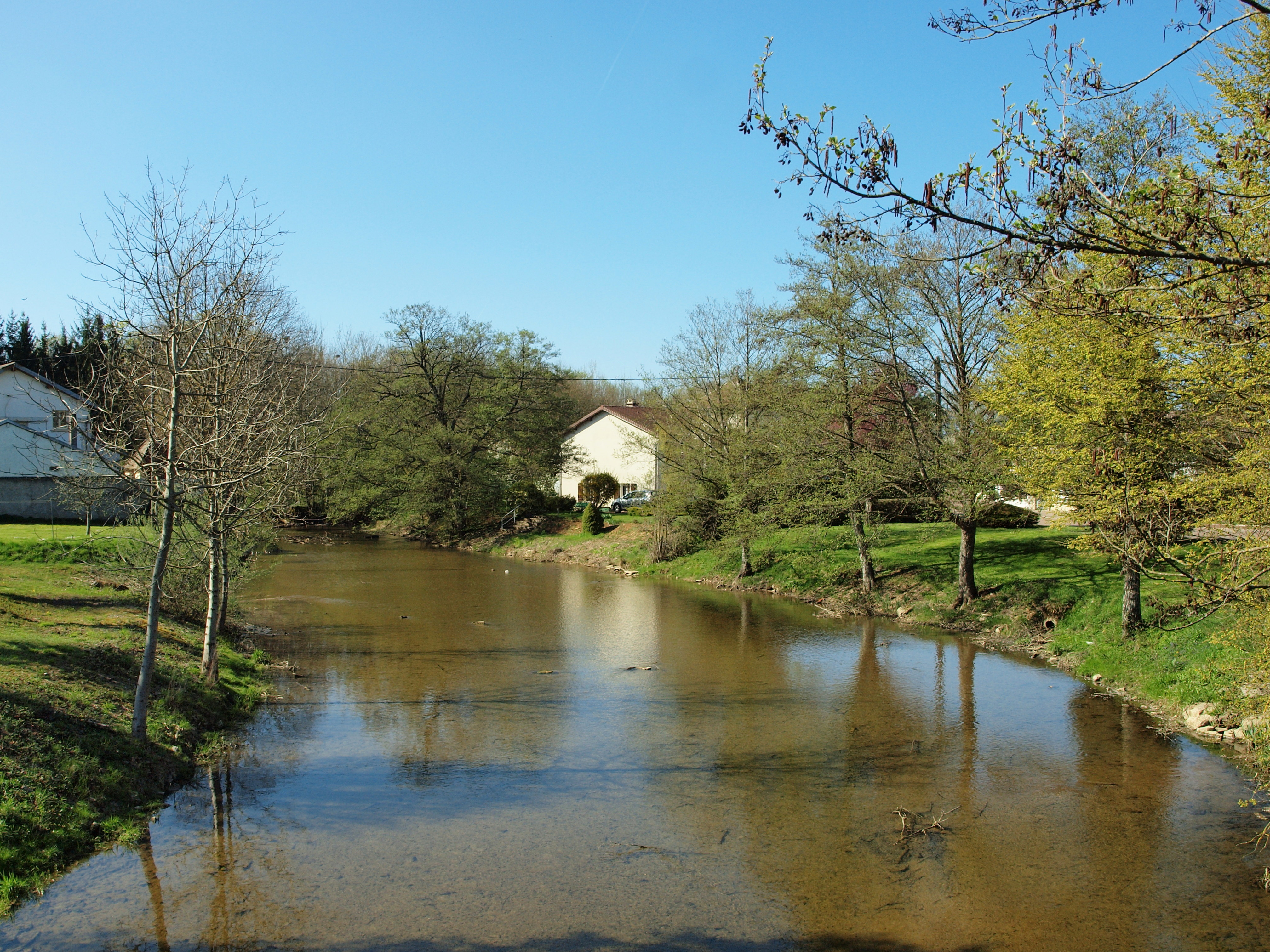 Villegusien-le-Lac (Haute-Marne, France)